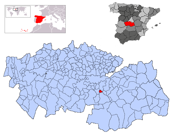 Chueca en la provincia de Toledo